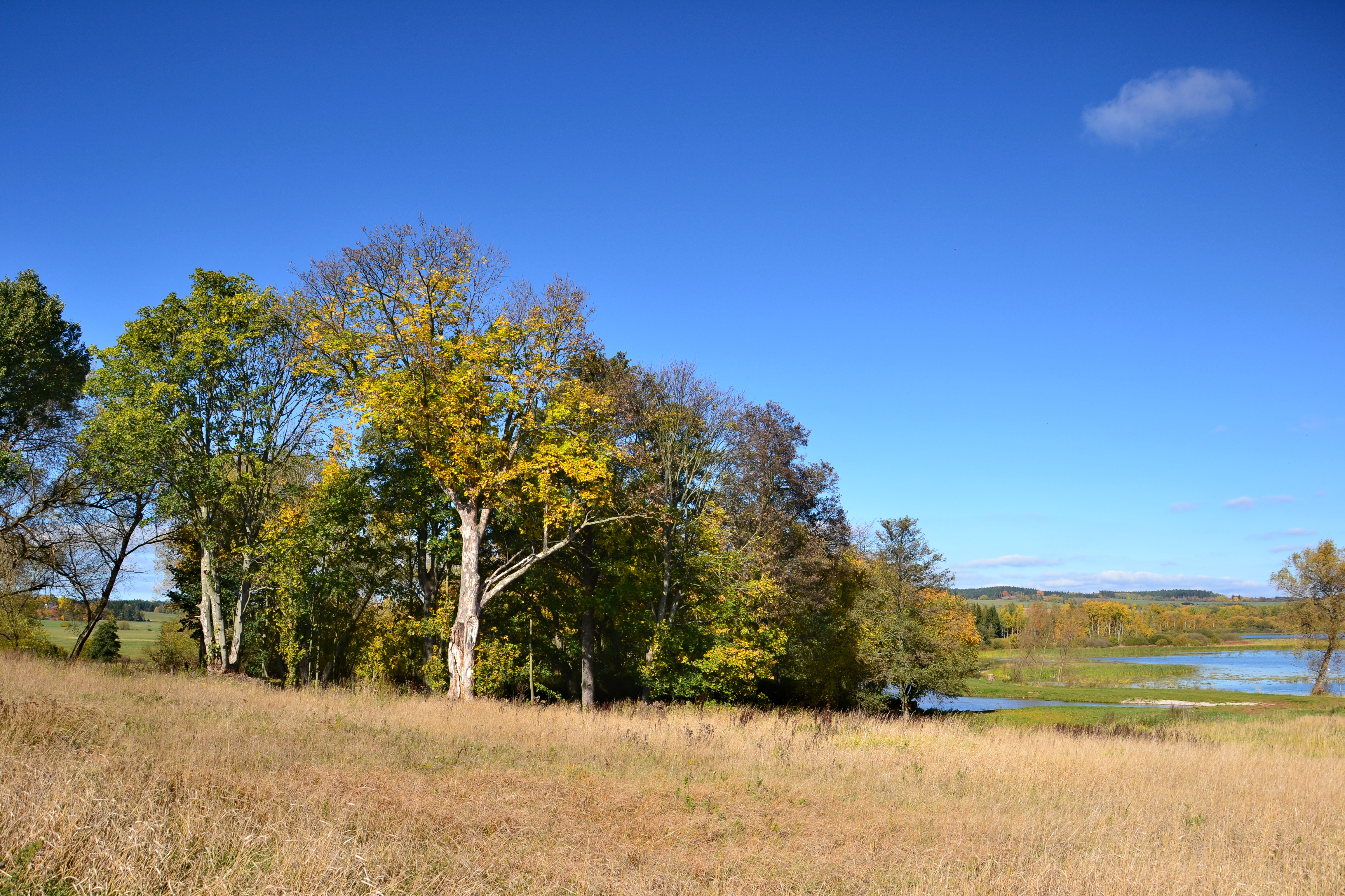 Prohořský hrádek – celkový pohled od jihu